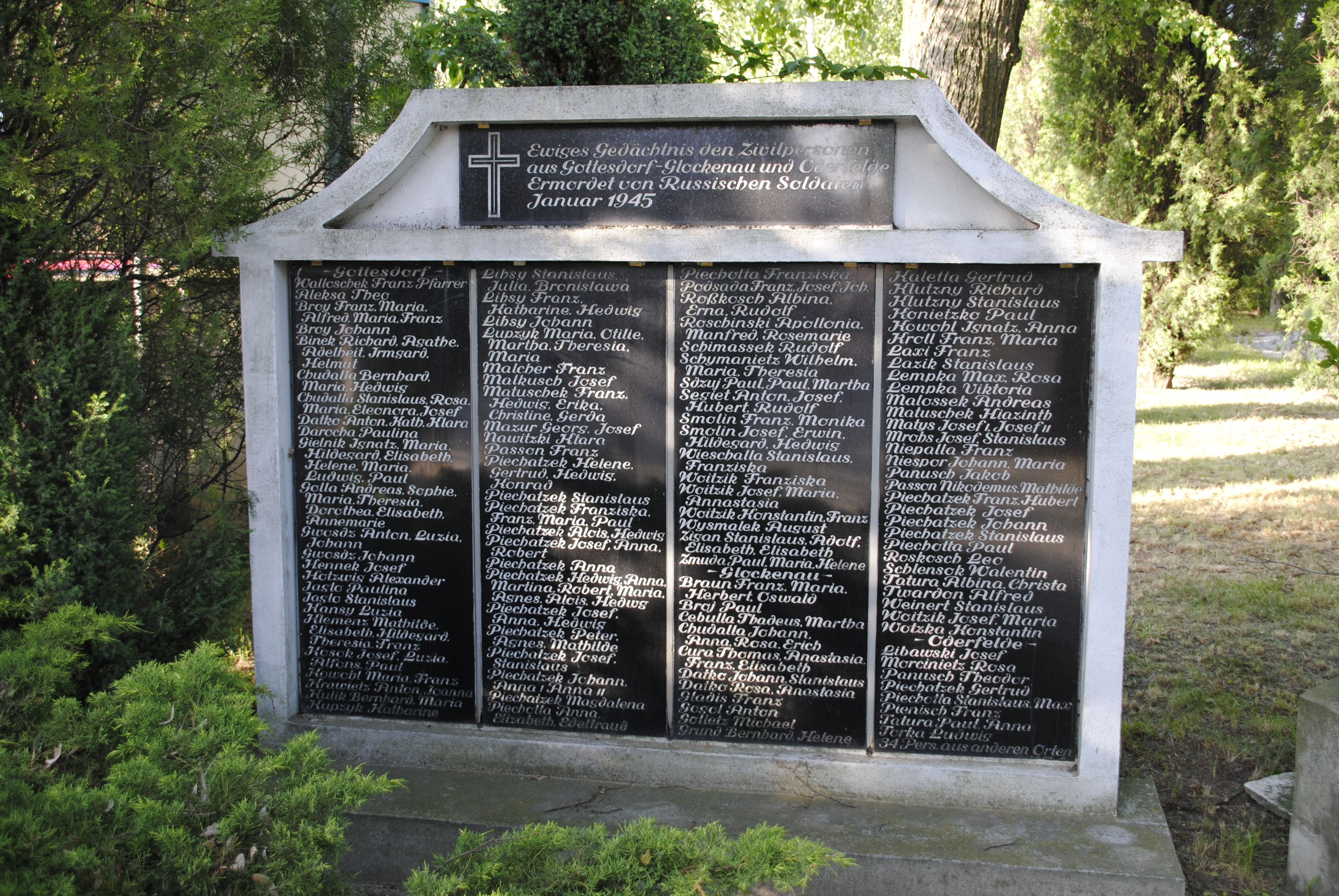 Denkmal für die durch die Russen getöteten Menschen im Januar 1945